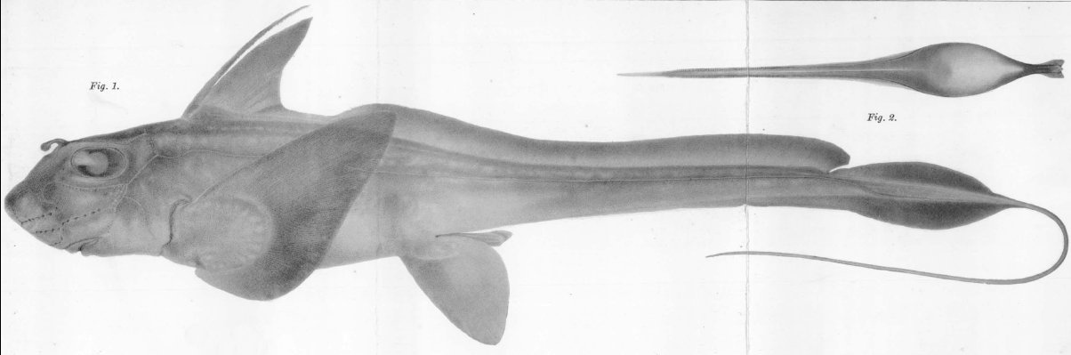 Hydrolagus mitsukurii